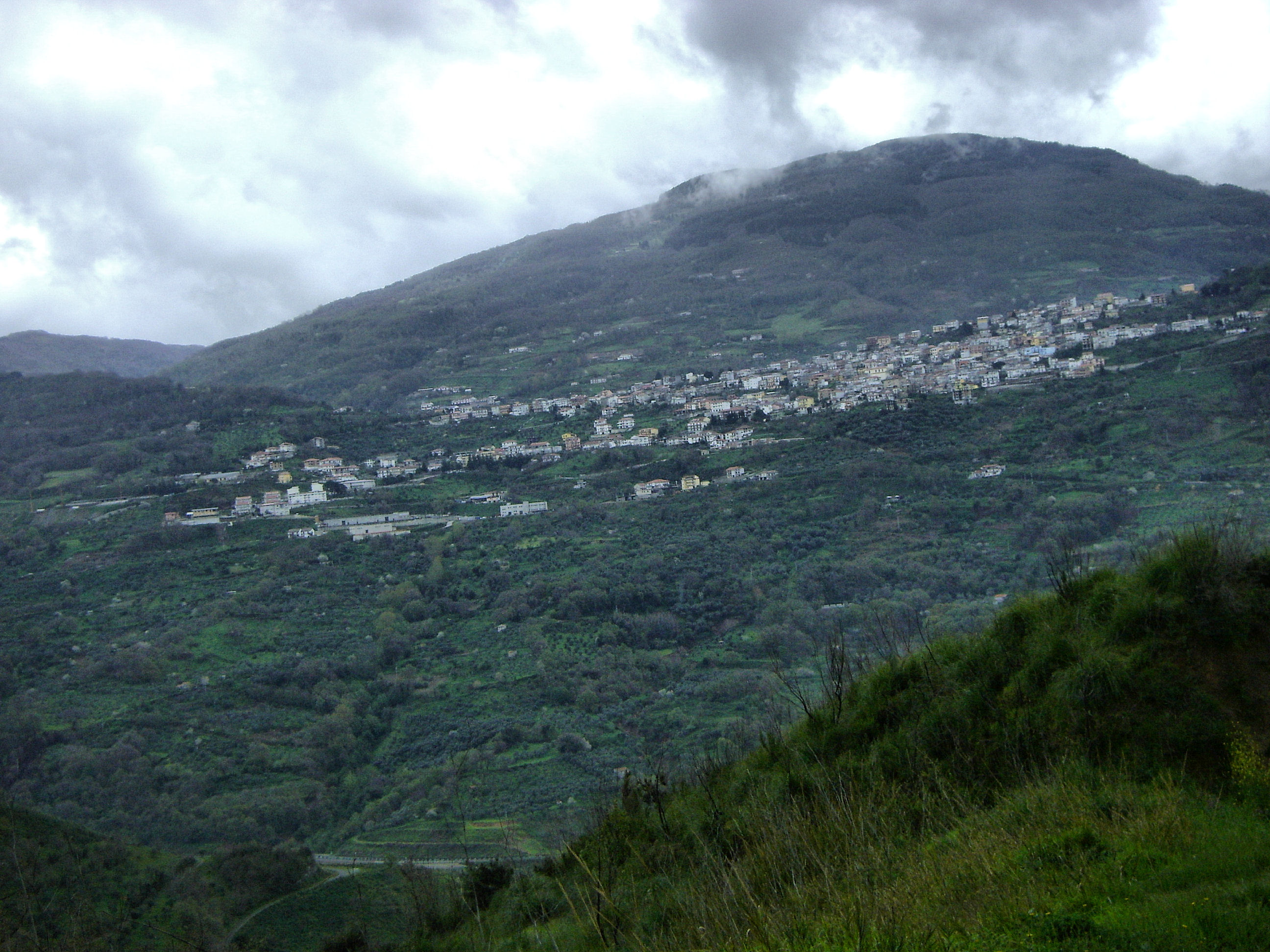 Panorama San Mango d'Aquino dalla Zona Castello di Savuto